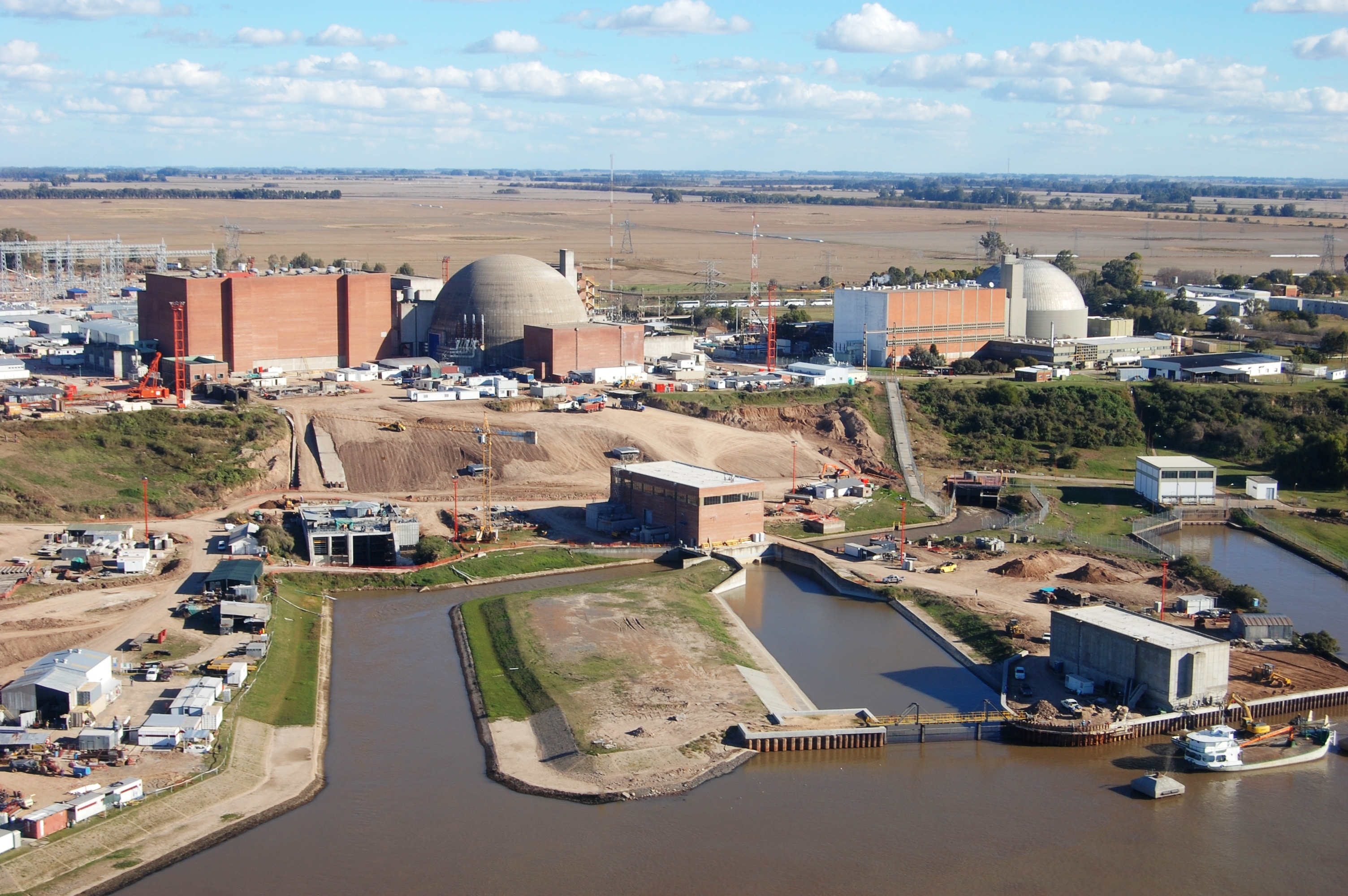 Central Nuclear Atucha I - II